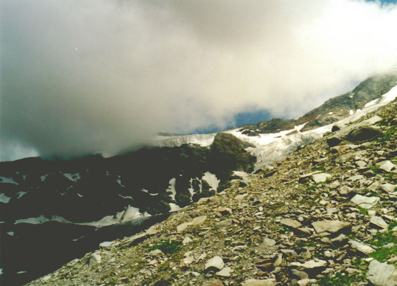 eigen foto 2004. de bergen bij pralognan-la vanoise, op circa 2300 meter hoogte